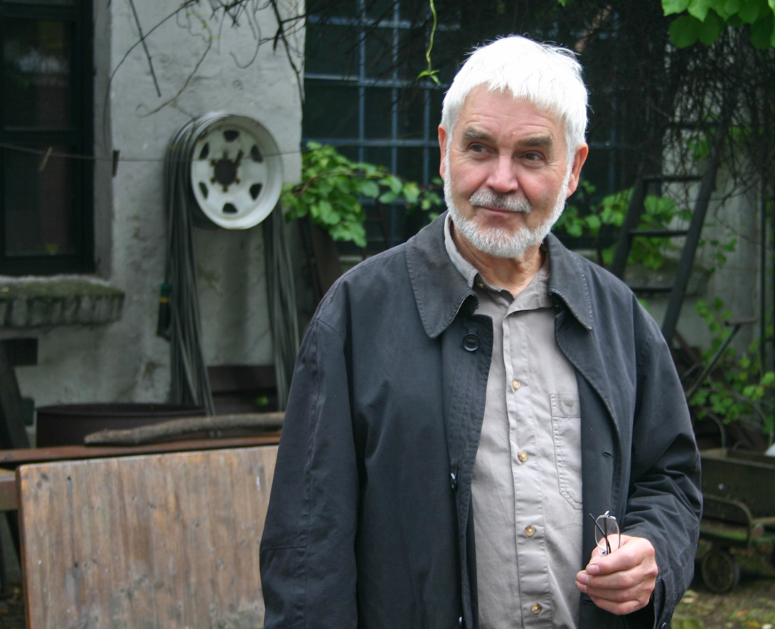 Der Kunstschmied Achim Kühn führt interessierte Besucher am Tag des offenen Denkmals durch sein Atelier und seine Werkstatt.